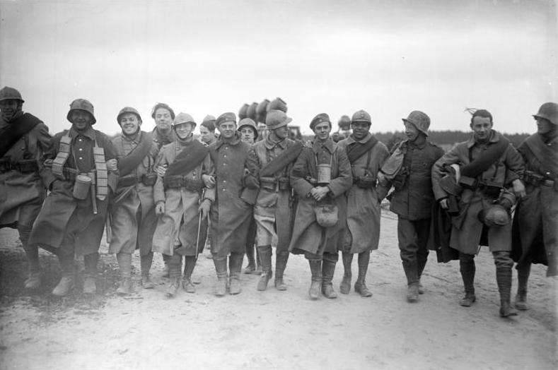 Der Krieg an der Westfront im Tonfilm! In Petersdorf in Frankfurt a/O. wird zurzeit ein grosser Kriegsfilm von der Westfront 1918 unter Mitwirkung ehemaliger deutscher und französischer Frontsoldaten aufgenommen. Das Aufnahmegelände für den Kriegsfilm umfaßt mehrere Kilometer. Die Schützengräben und Unterstände sind getreu den Vorbildern der Westfront nachgeahmt. Ehemalige deutsche und französische Frontsoldaten begeben sich in das Aufnahmegelände zum Tonfilm.